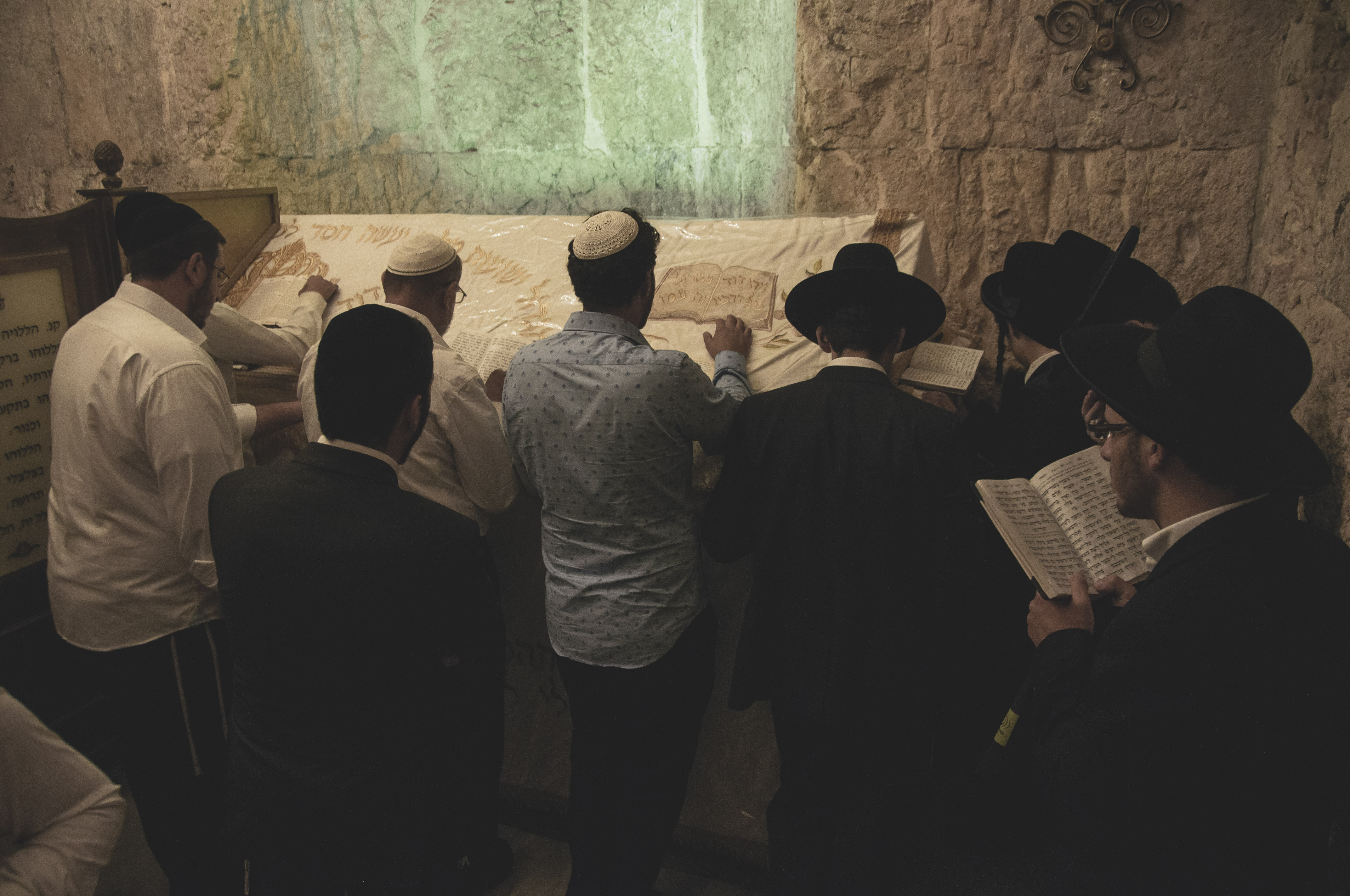 מתפללים בקבר דוד המלך